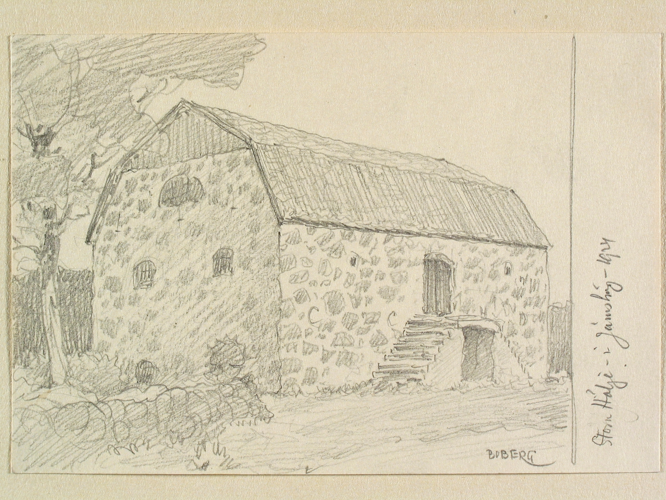 Blekinge, Stora Holje. Gårdsbebyggelse. Teckning av Ferdinand Boberg Depicted place: Listers (Härad), Stora Holje ? (Ort), Q10541681 (Q10541681)